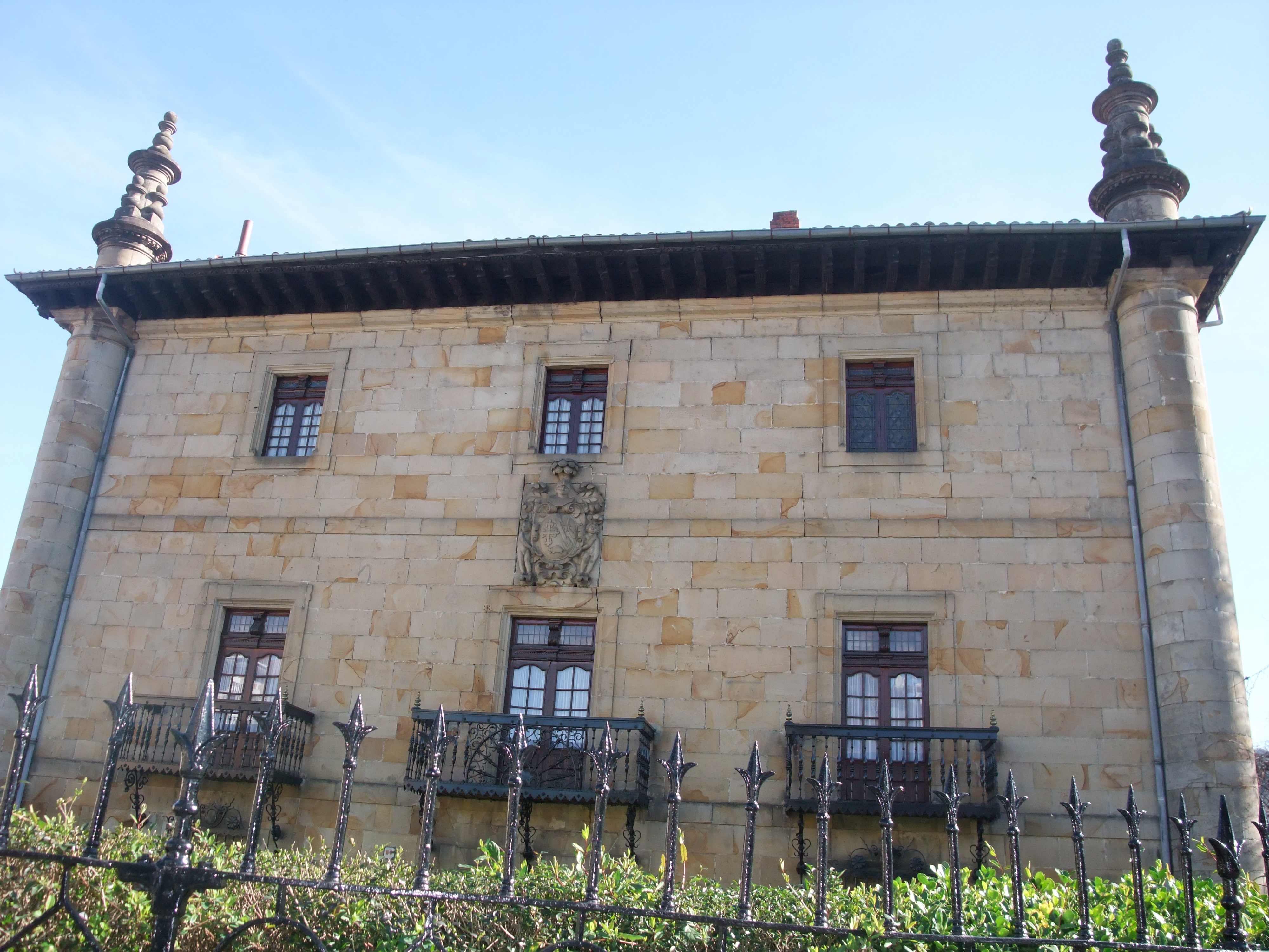 Elorrio (Vizcaya)-Palacio Urkizu-1